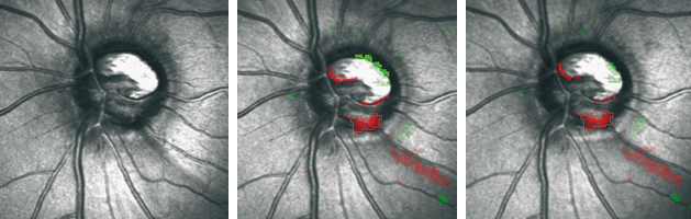 Verlaufskontrolle beim Glaukom mit dem HRT